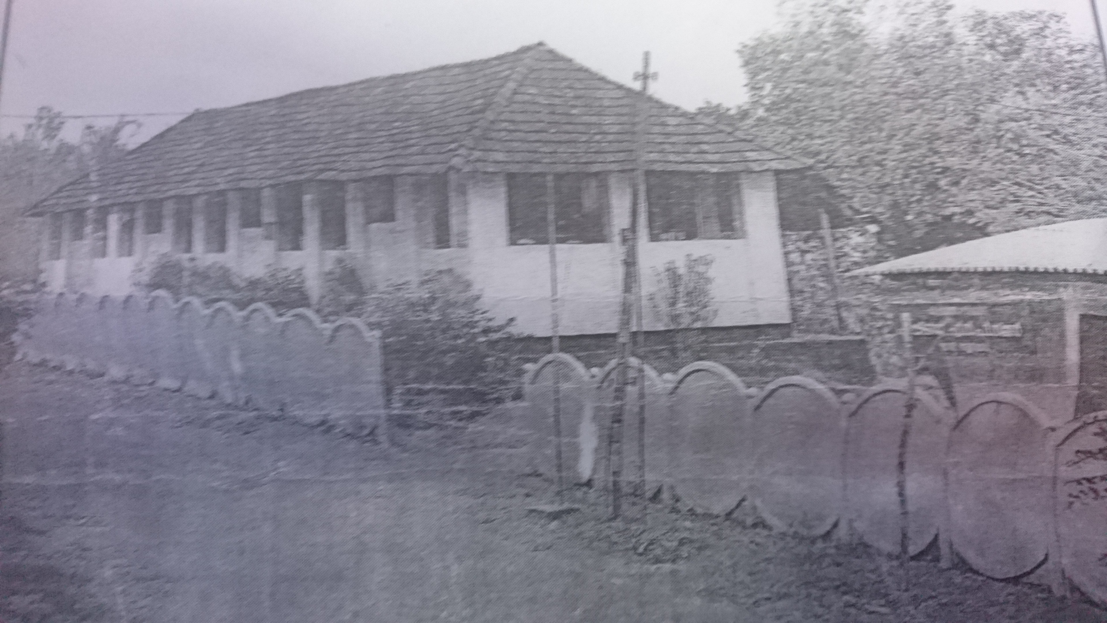 പനമ്പിള്ളി ഗോവിന്ദമേനോൻ മെമ്മോറിയൽ ലോവർ പ്രൈമറി സ്കൂൾ-കള്ളായി